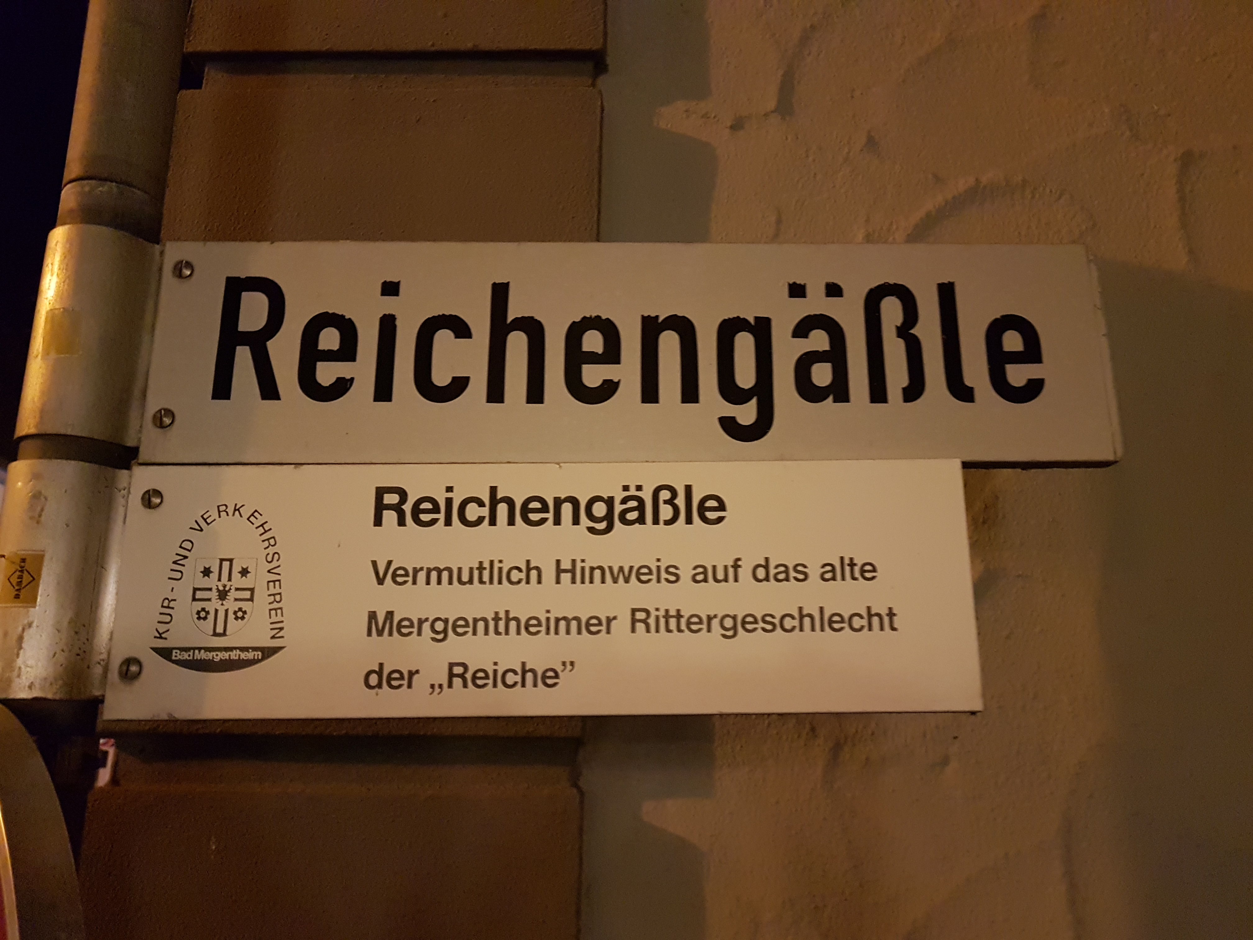 Reichengäßle (Bad Mergentheim)